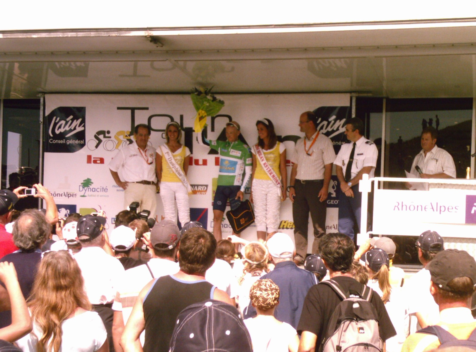 Classement final du Tour de l'Ain 2009 : maillot vert remporté par Chris Horner.